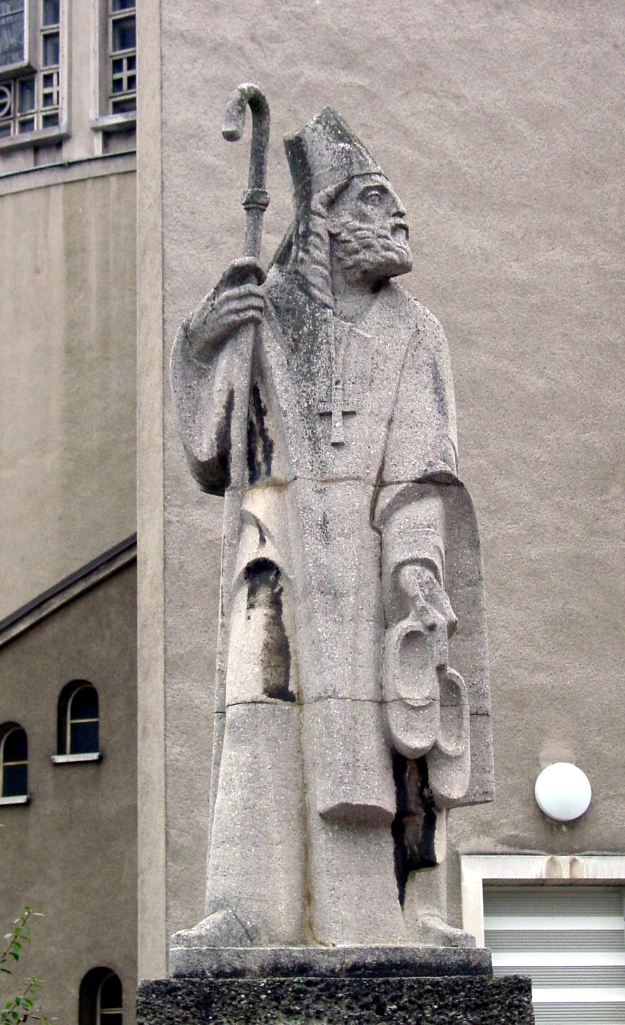 Pfarrkirche Liesing (Wien 23). Statue des Hl. Servatius von Adolf Treberer-Treberspurg.